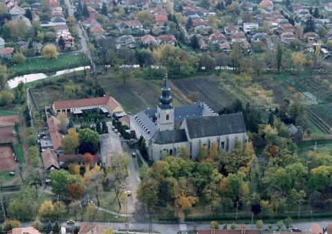 Jászberény - Temple